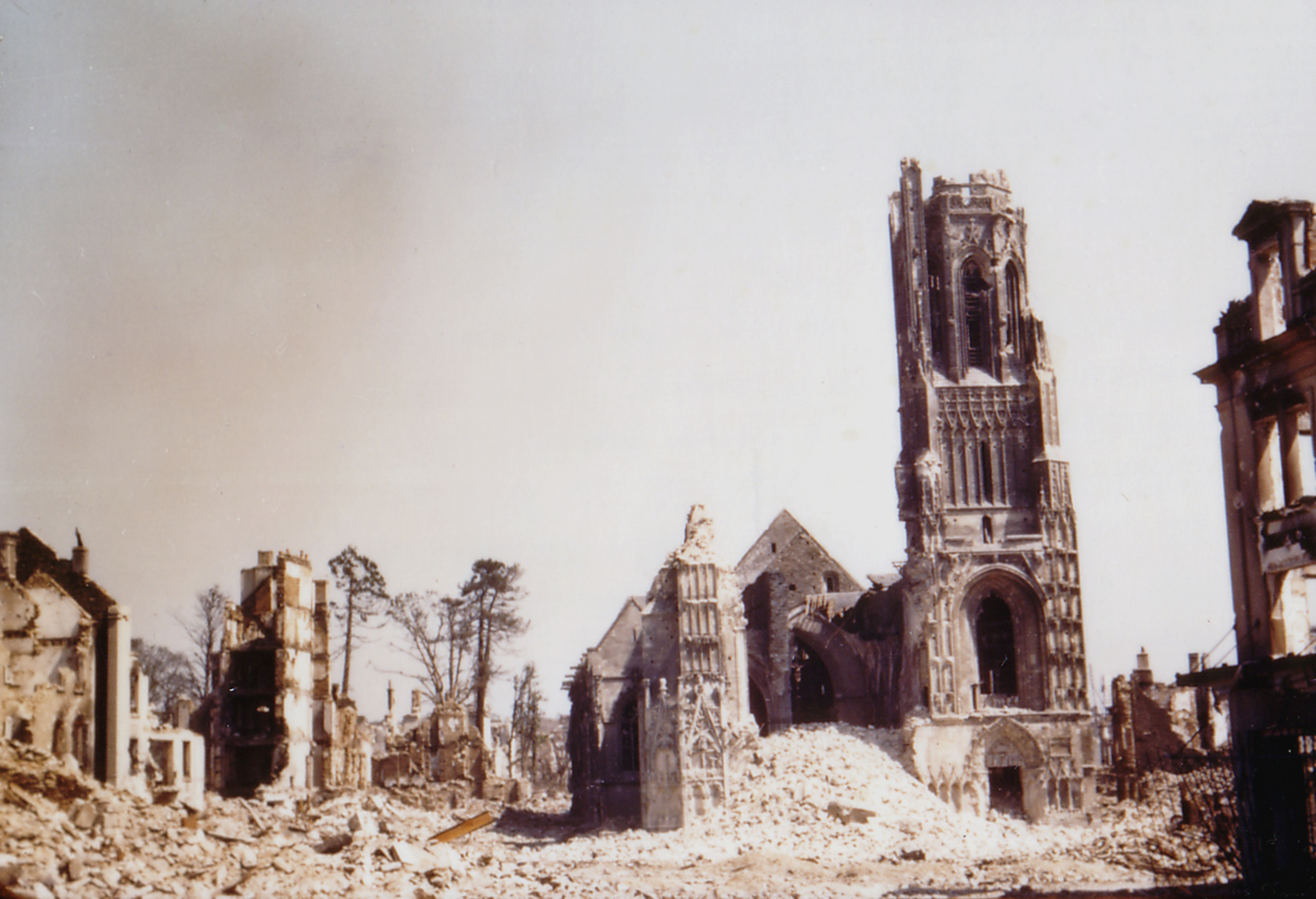 Bataille de Normandie : photographie en couleurs / Eté 1944 : libération de Saint-Lô ruines de l'église Notre Dame.